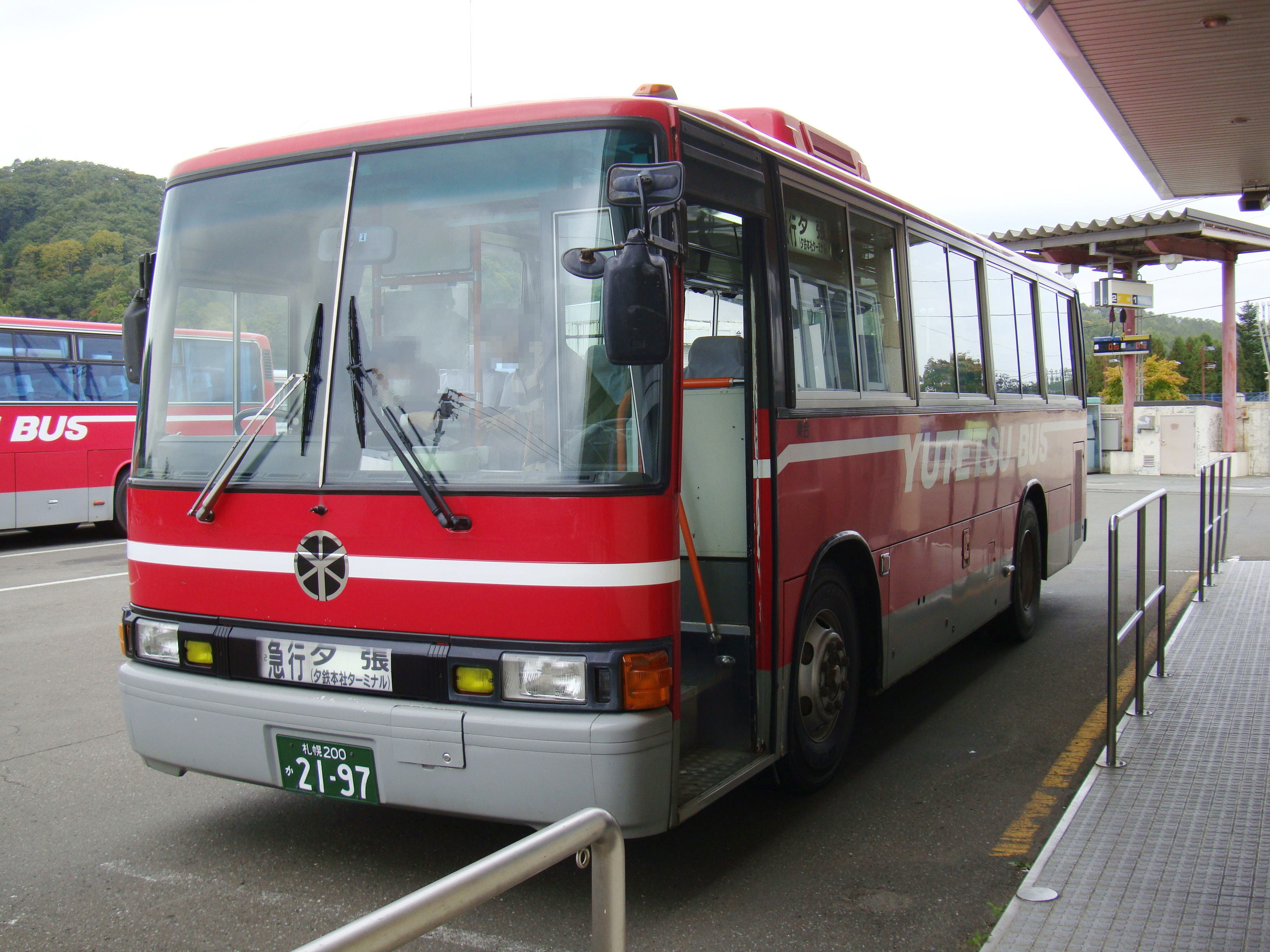 Sapporo to Yūbari